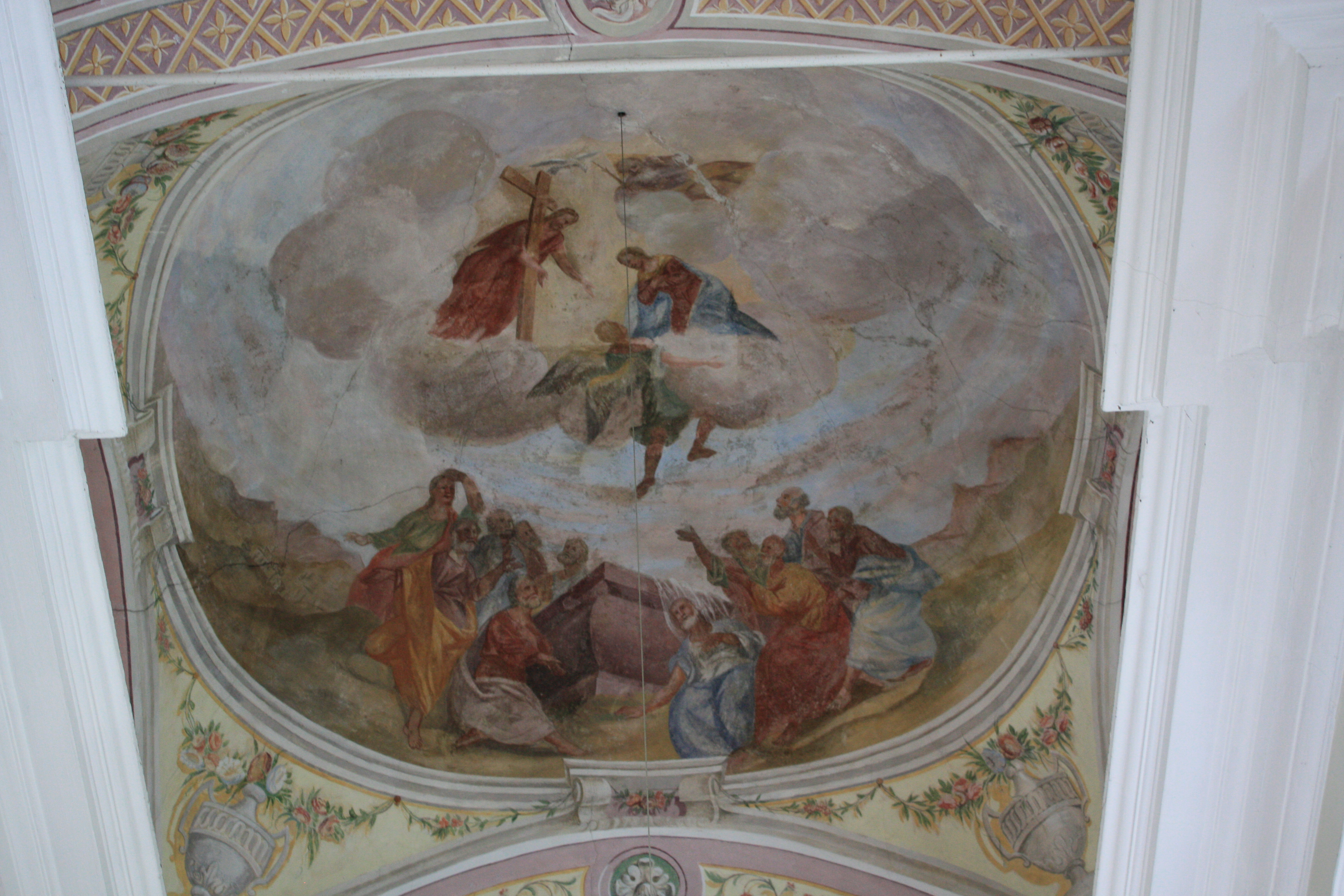 Kath. Filialkirche Maria-Heimsuchung